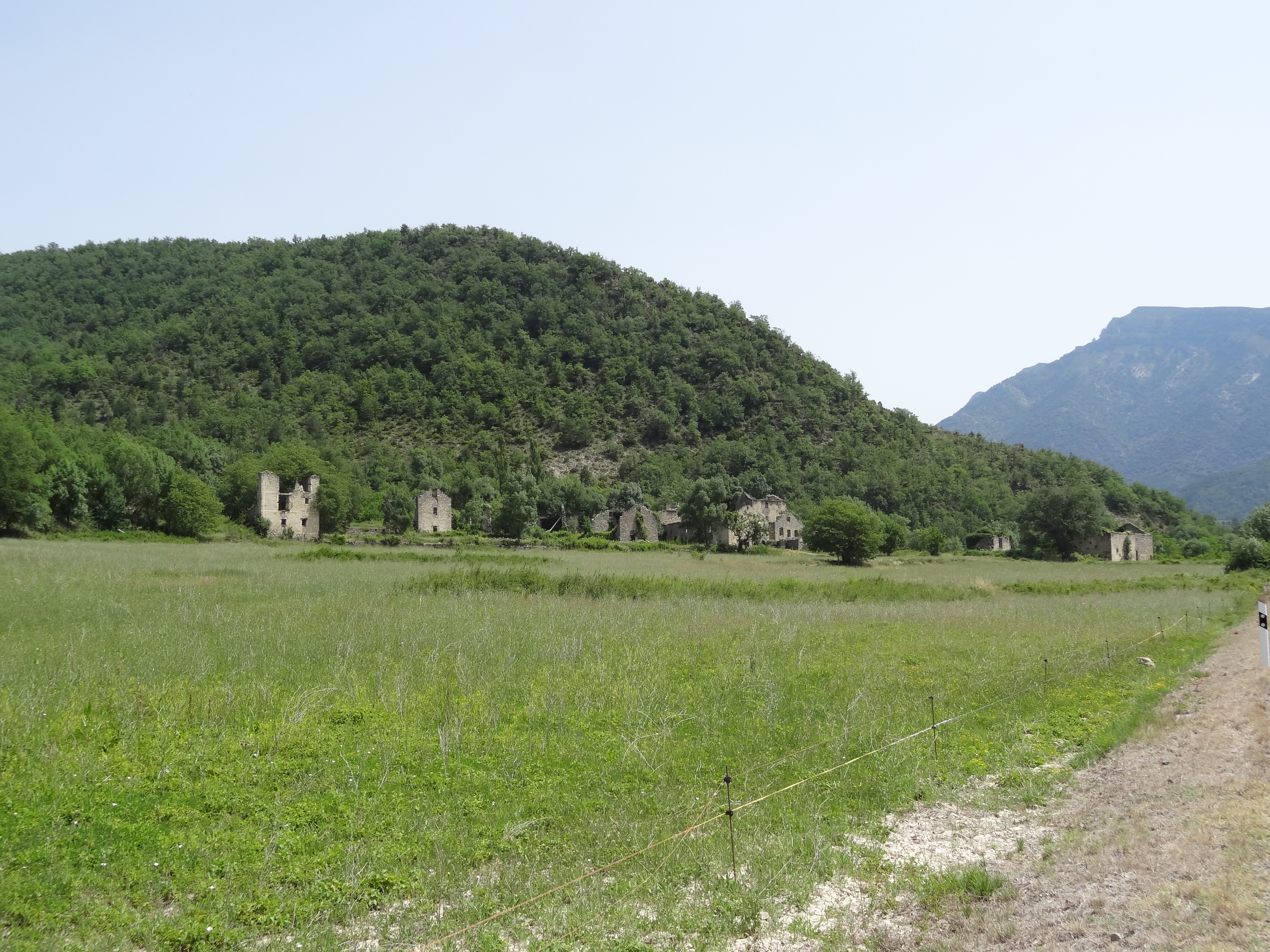 Lacort